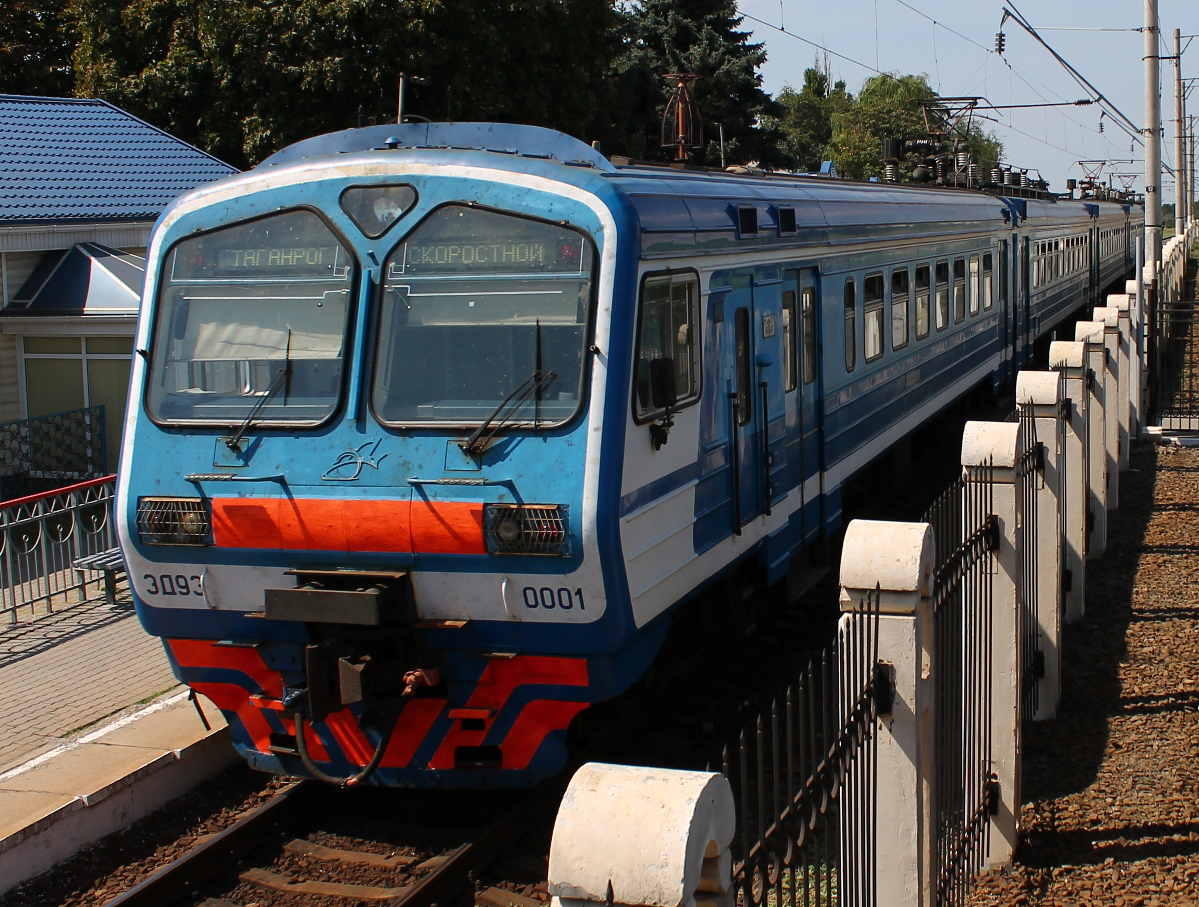 ЭД9Э-0001, о.п. Гниловская, Ростов-на-Дону. см. фото 529875 в альбоме автора